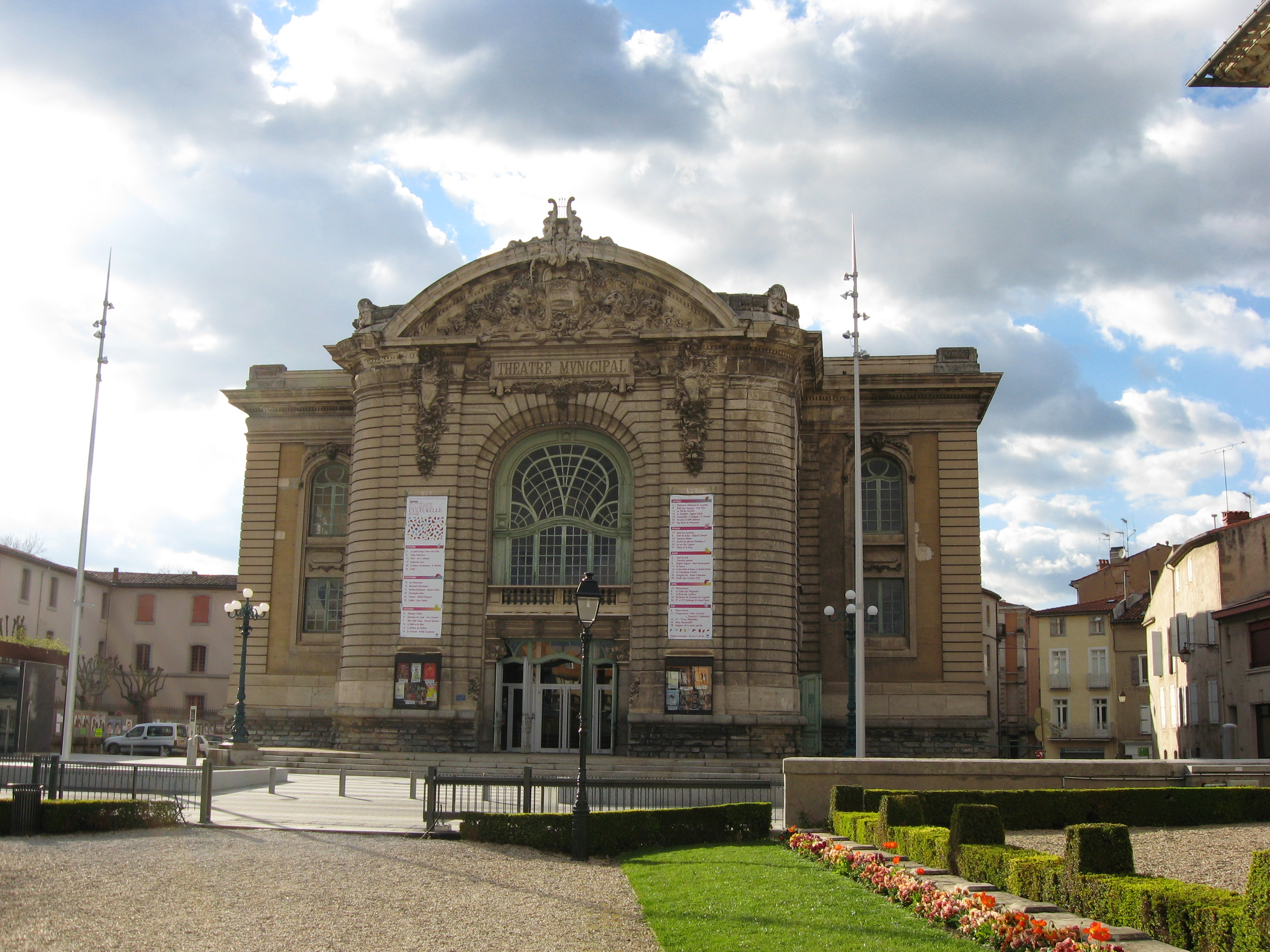 Théâtre municipal de Castres